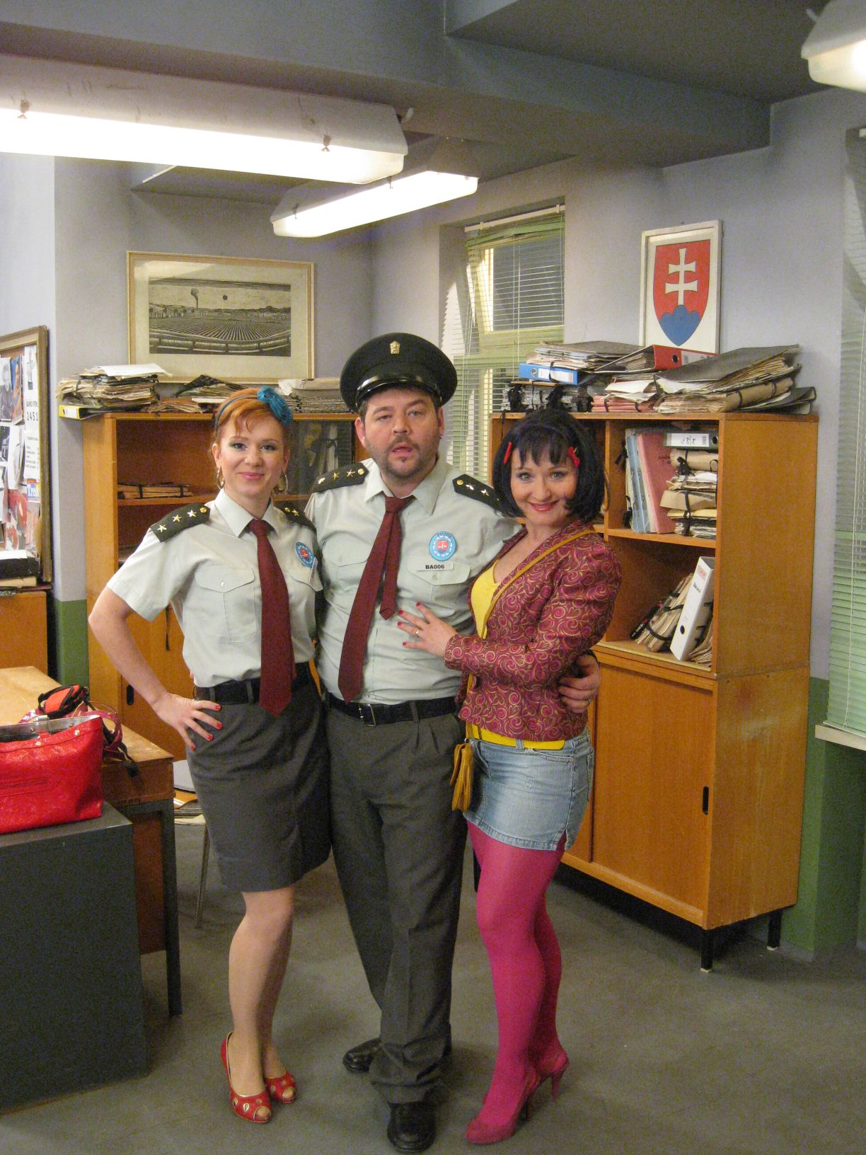 S Helenou Krajčiovou a Michalom Hudákom v seriáli Profesionáli